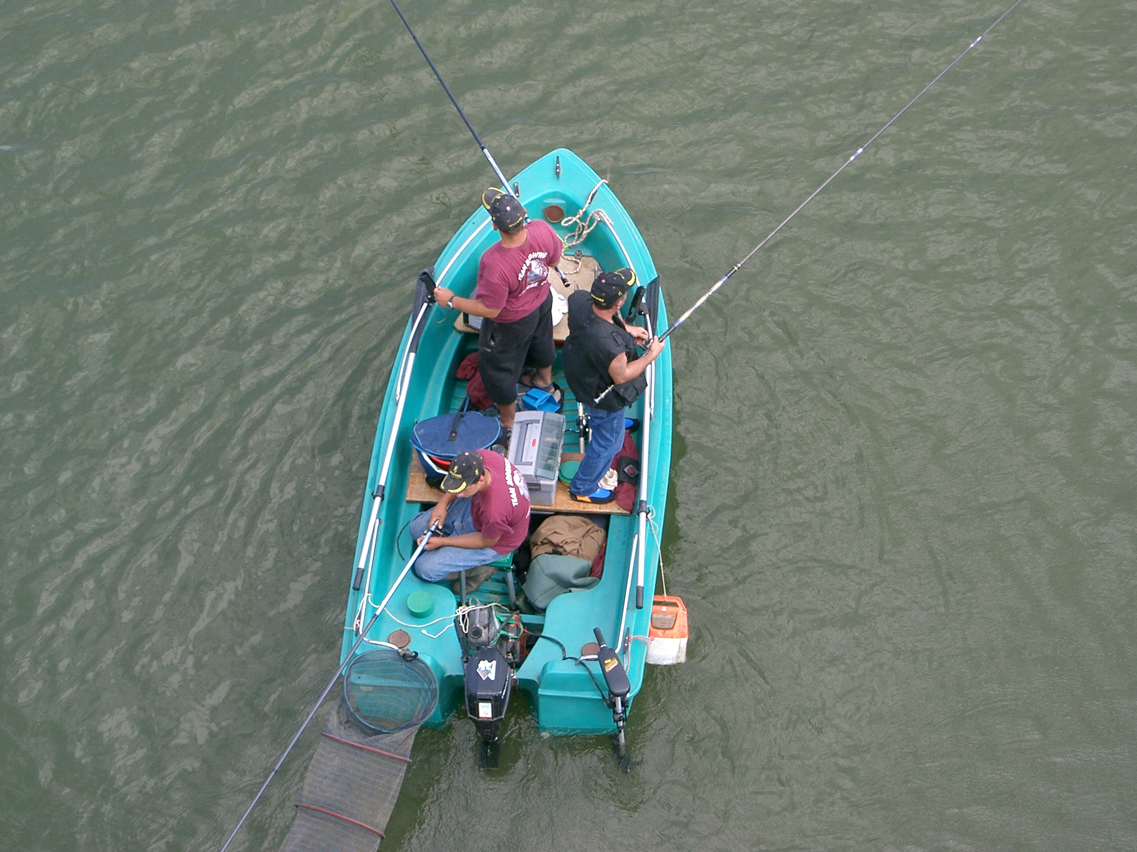 Pêcheurs en barque sur la Saône à Verdun-sur-le-Doubs - France